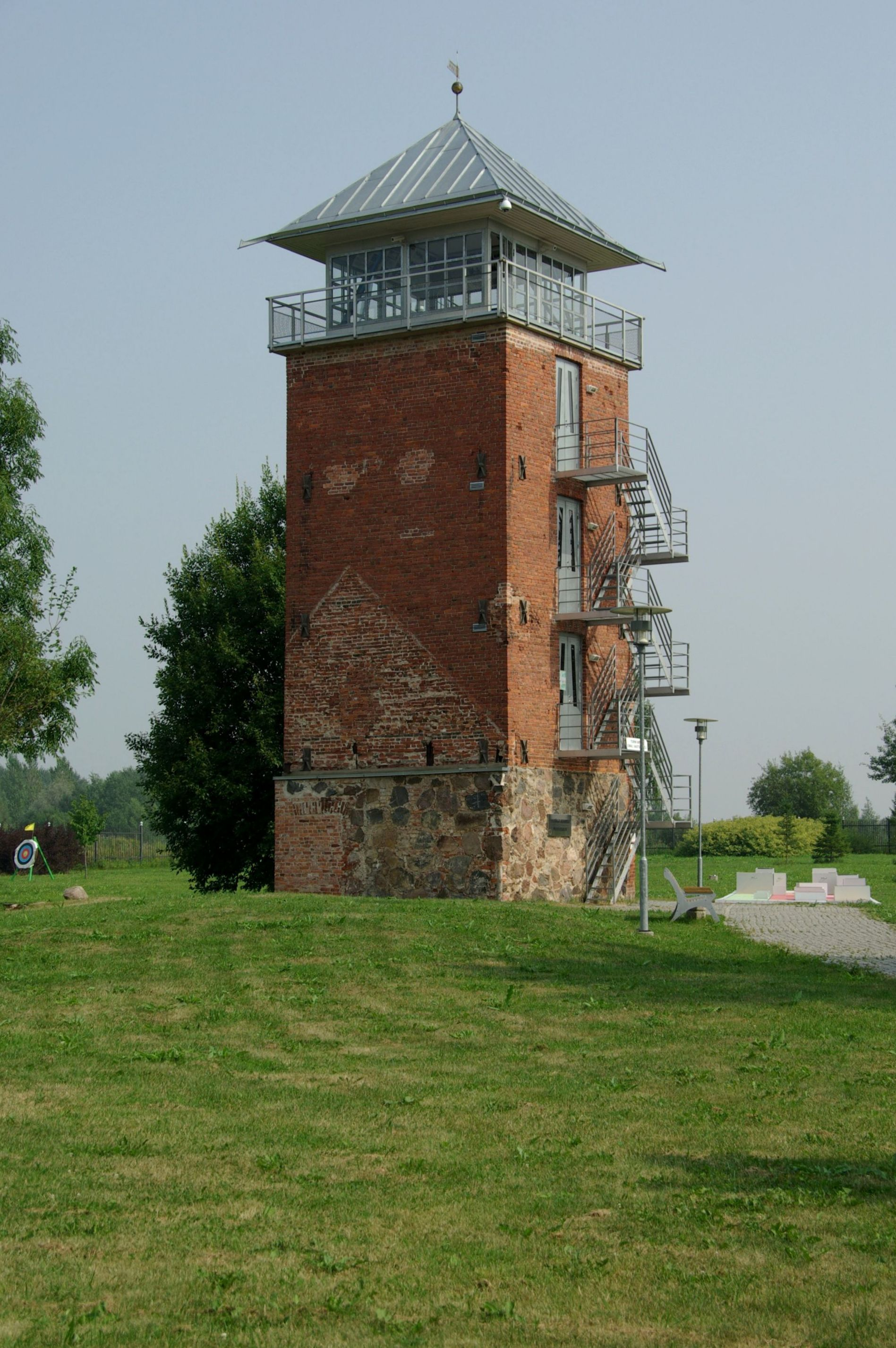 Raadi mõisa endine veetorn